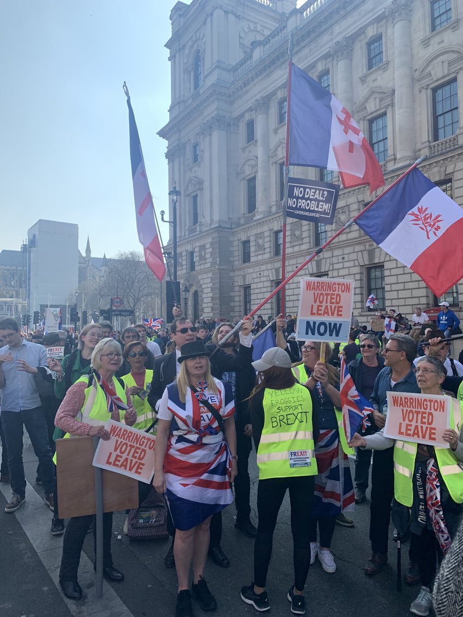 Drapeaux de la France libre à Londres lors de la marche de soutient au Brexit